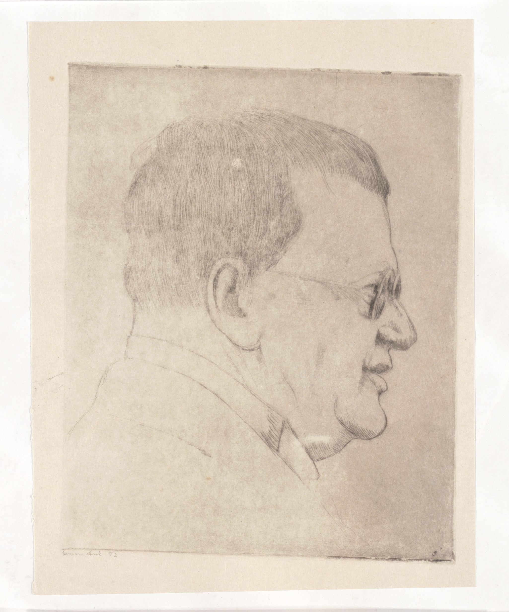 Artwork by Hermann Struck Dargestellte Person: Rutenberg, Pinchas (5.2.1879 - 3.1.1942), DNB-Link Datierung Display: ca. 1930 - 1944 Objektart: Radierung, Vernis mou Schlagworte Inhalt /Geografie: Mann, Porträt, Zustandsdruck, Brille Schlagworte Kontext: Zionismus, Unternehmer